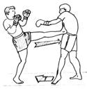 front_arret1.jpg